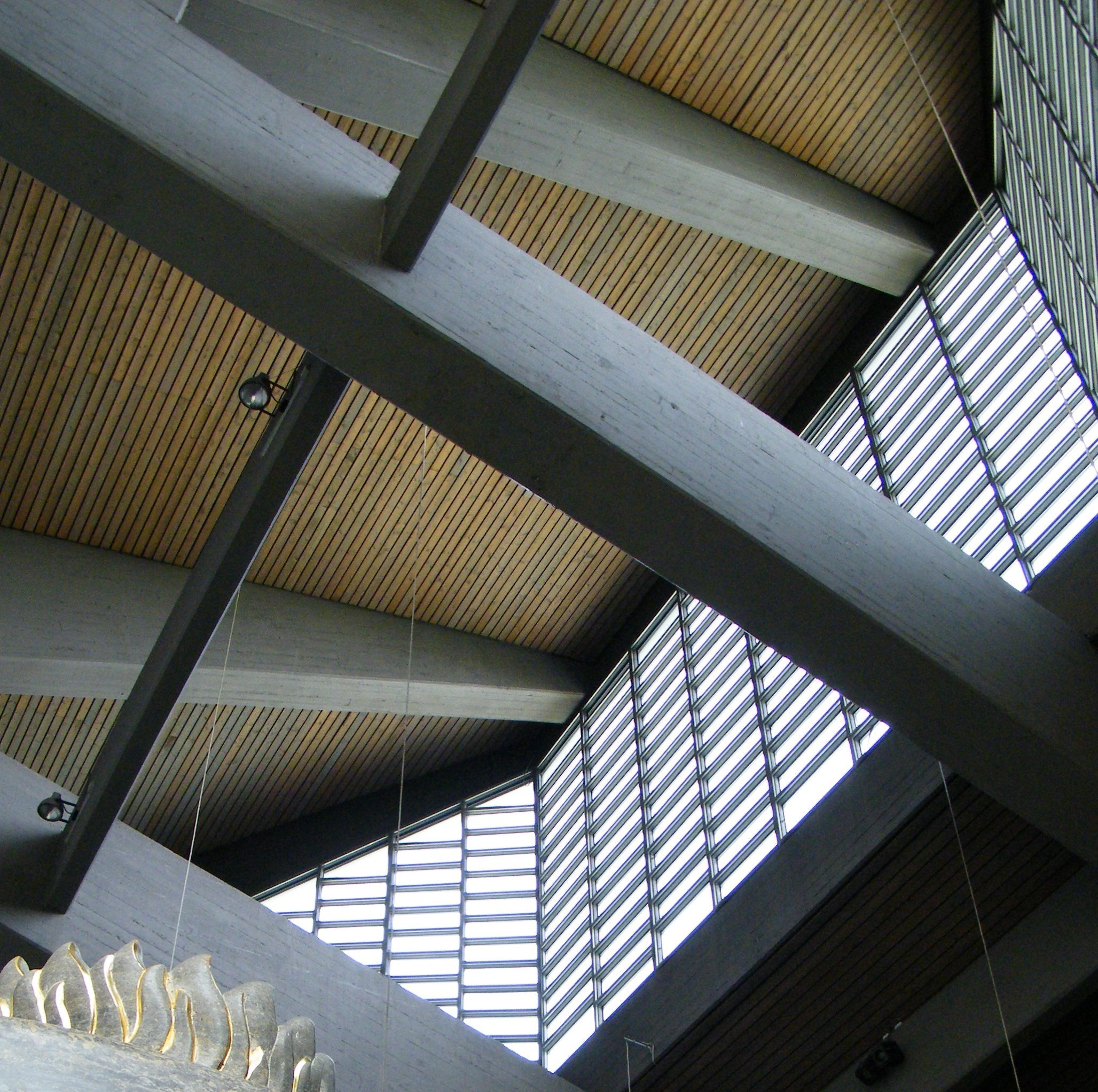 Lichtführung von oben